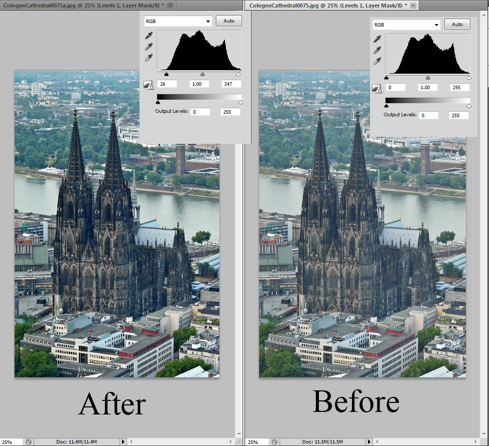 דוגמה לניגודיות בעיבוד תמונה